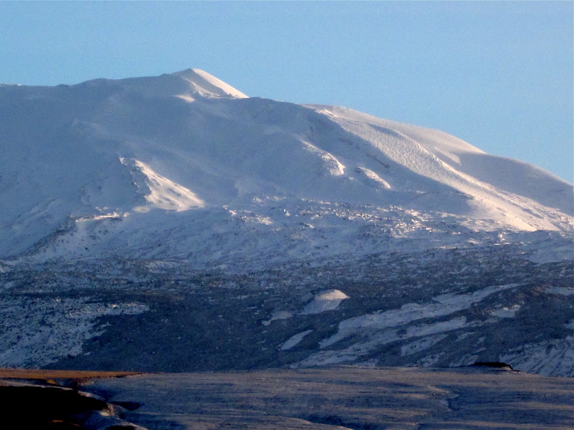 Iceland volcano